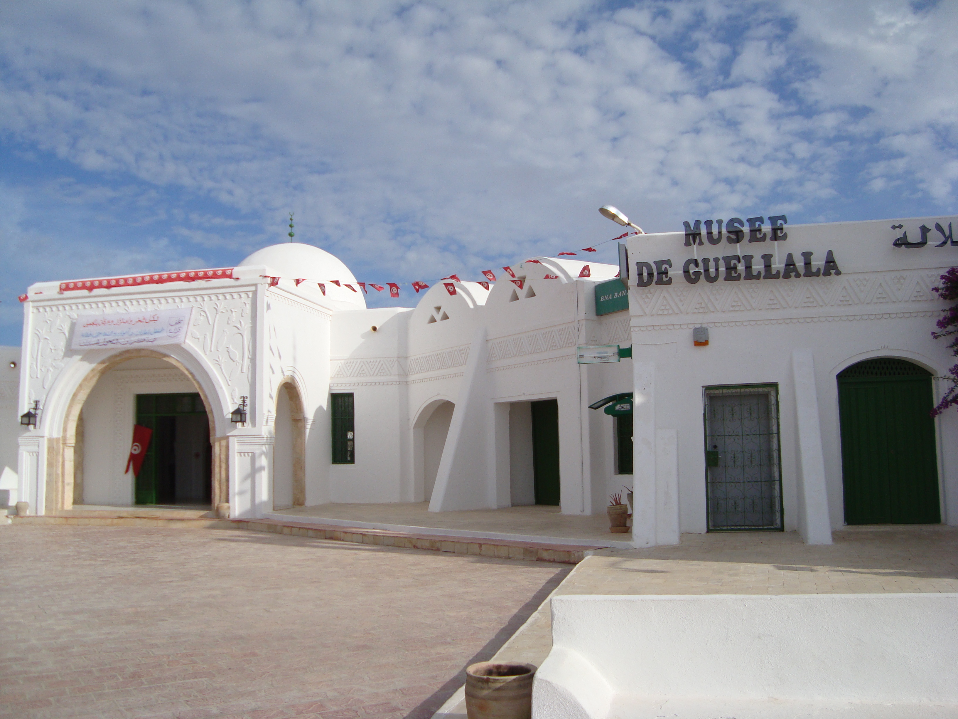 Façade du Musée de Guellala